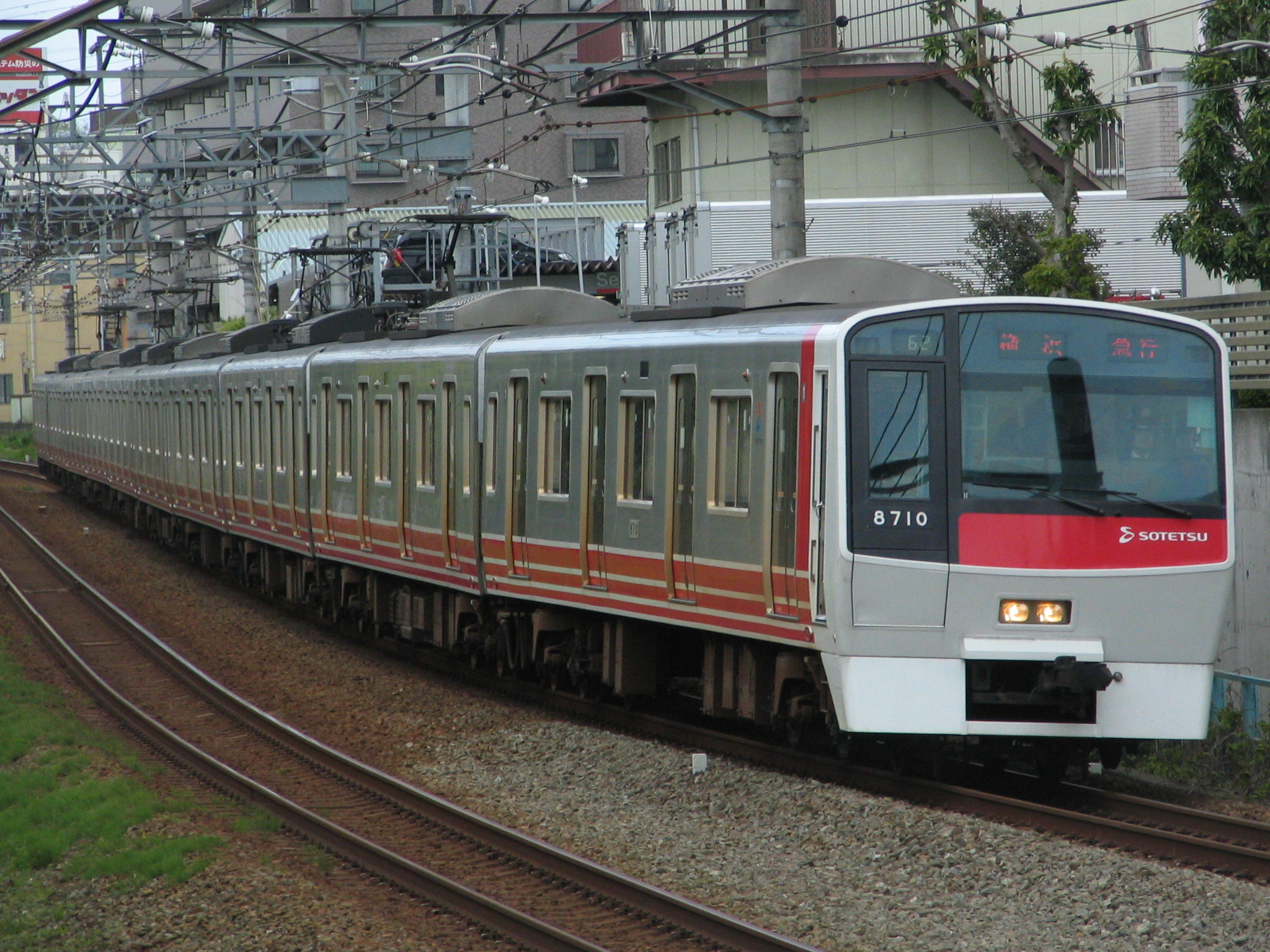 相模鉄道8000系 希望ヶ丘～二俣川にて